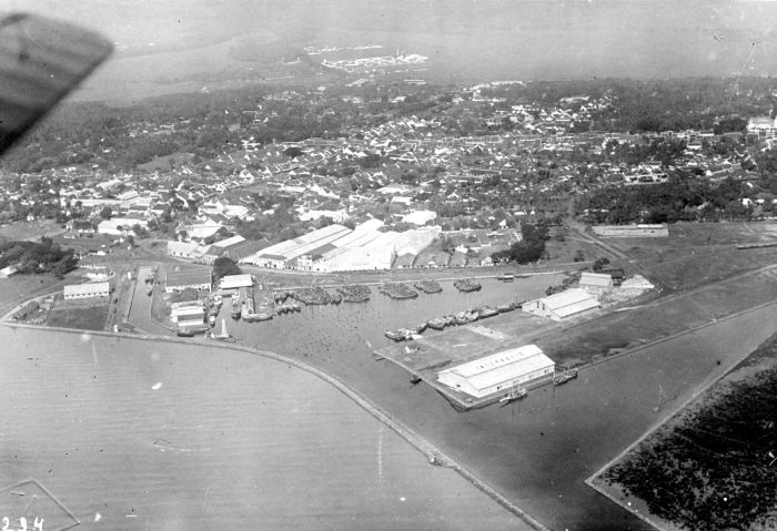 Repronegatief. De prauwenhaven te Cheribon, Java